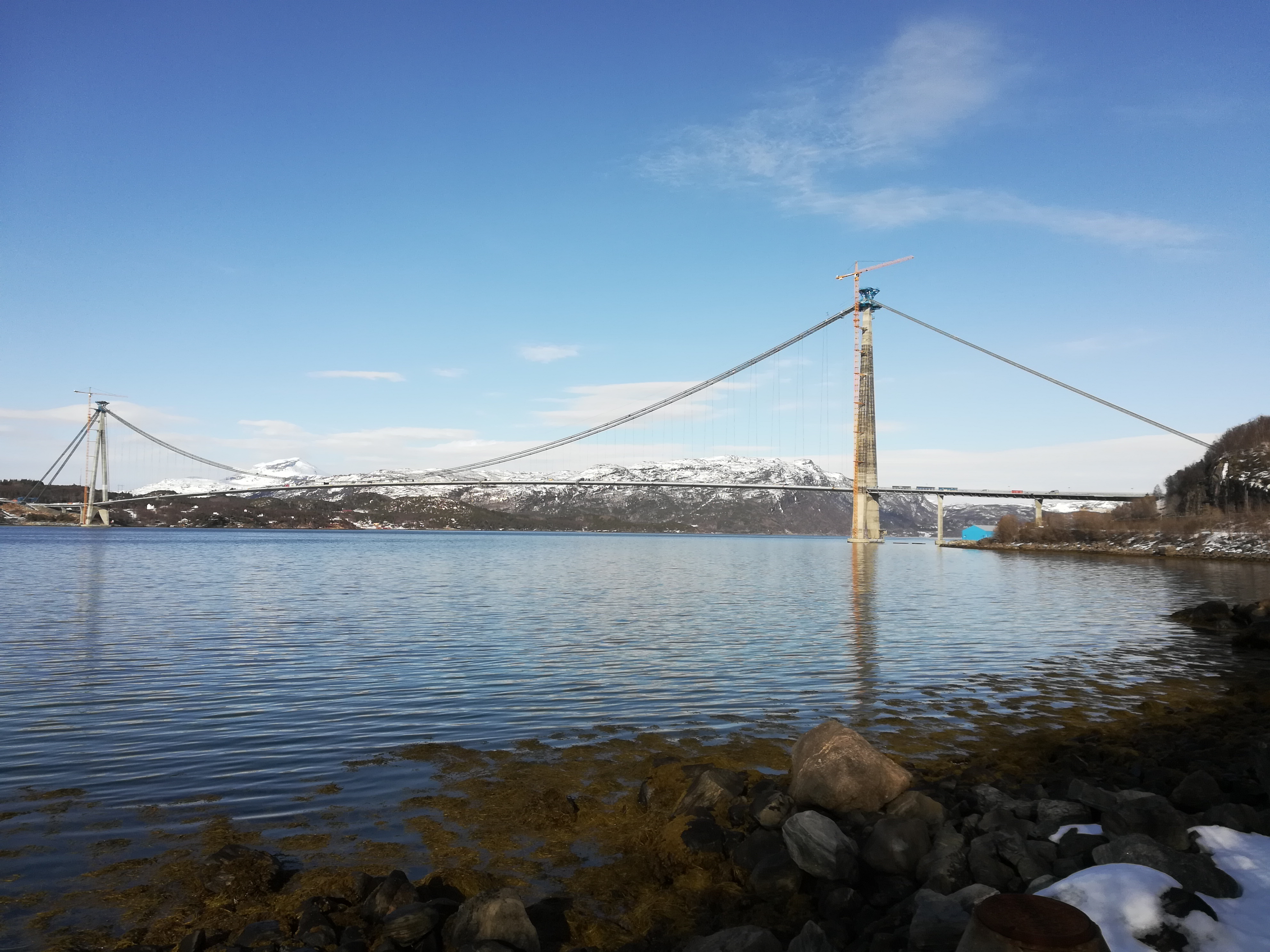 Hålogalandsbrua.